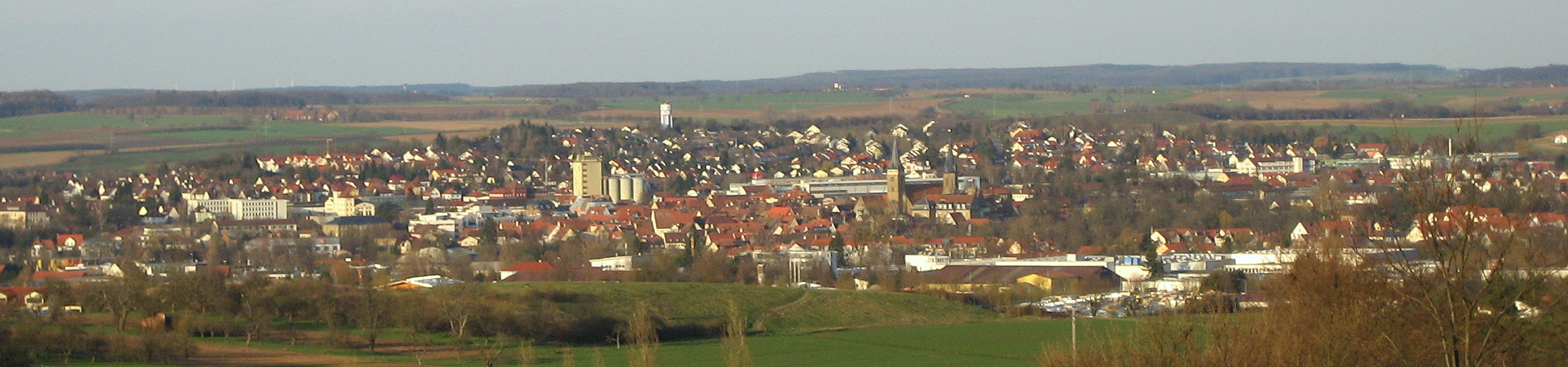 Öhringen Panoramablick vom Golberg